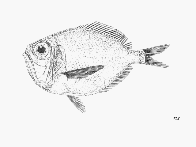 Malcarado alón (Diretmoides pauciradiatus)